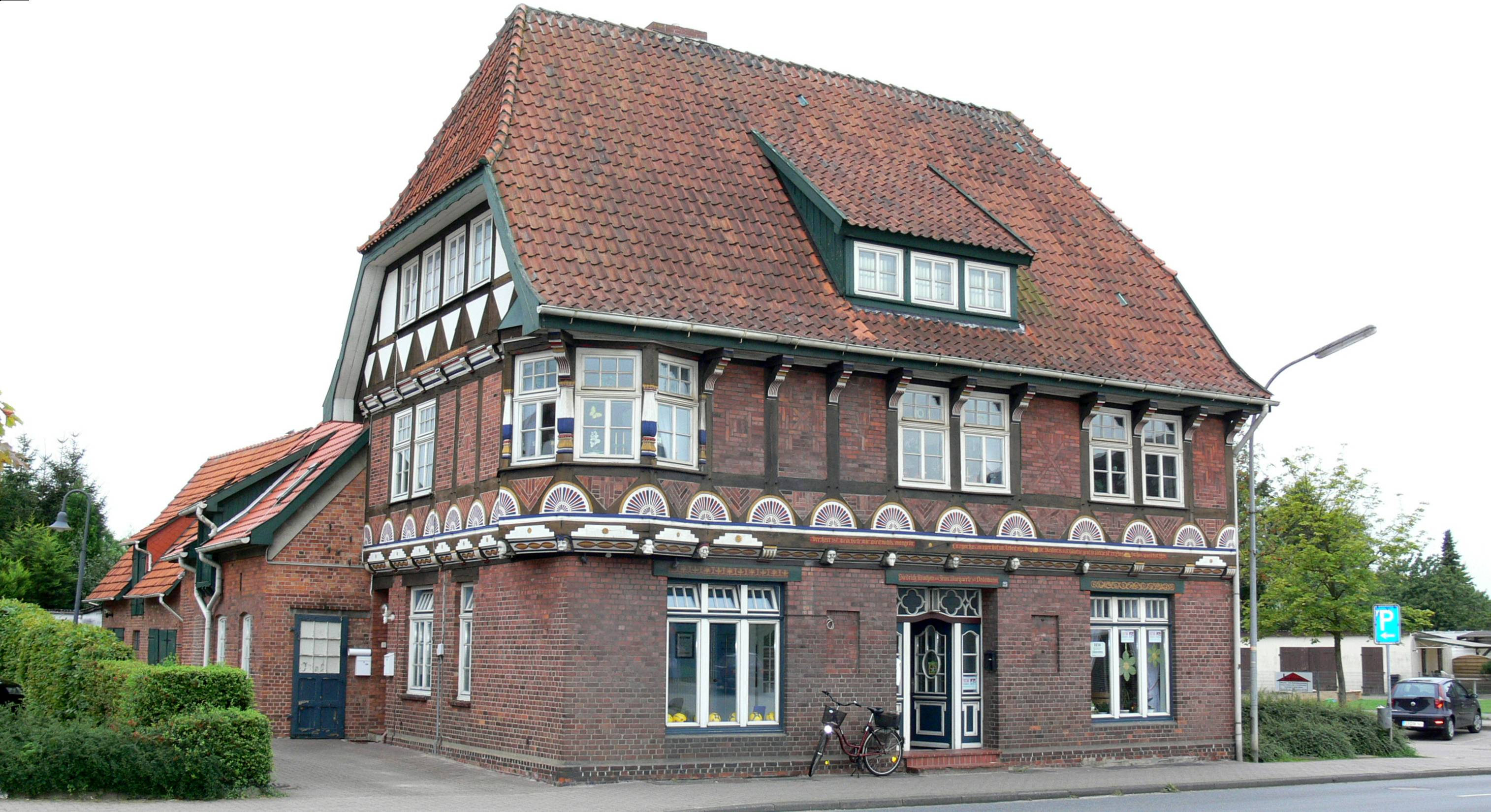 Wintjenhaus in der Logestraße in Beverstedt